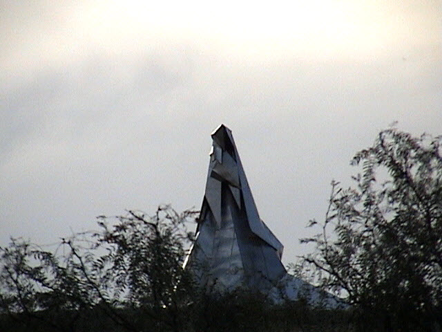 Escultura monumental del arquitecto José Arturo Martinez Lazo. Se le conoce también como Nuestra Señora del Campo y como la Virgen del Cerrito.